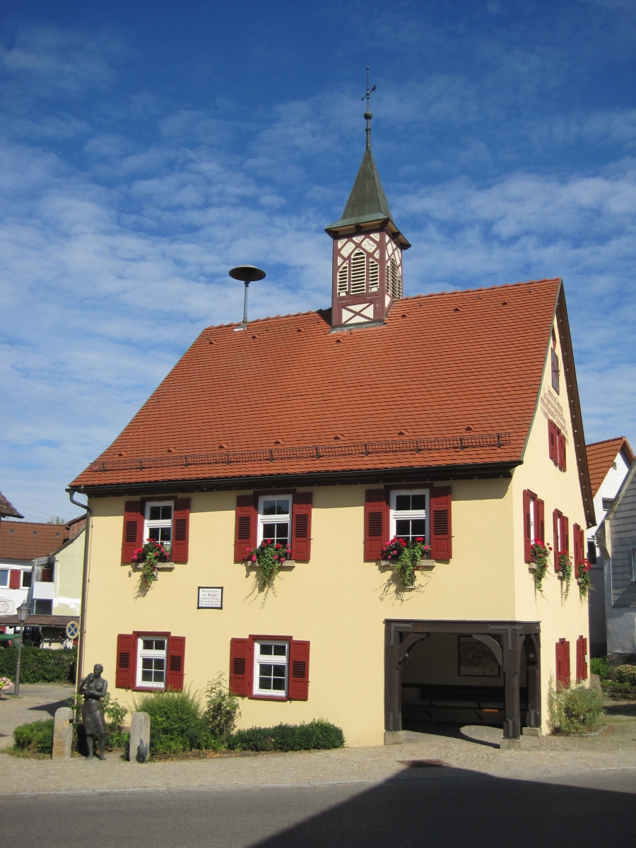 Das ehemalige Rathaus in Balzholz